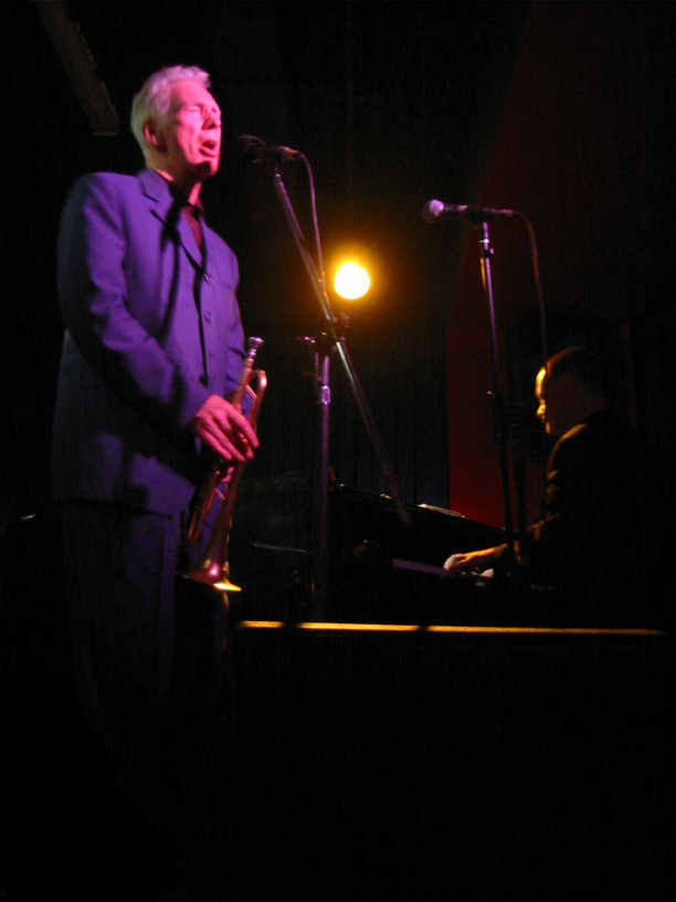 Vince Jones